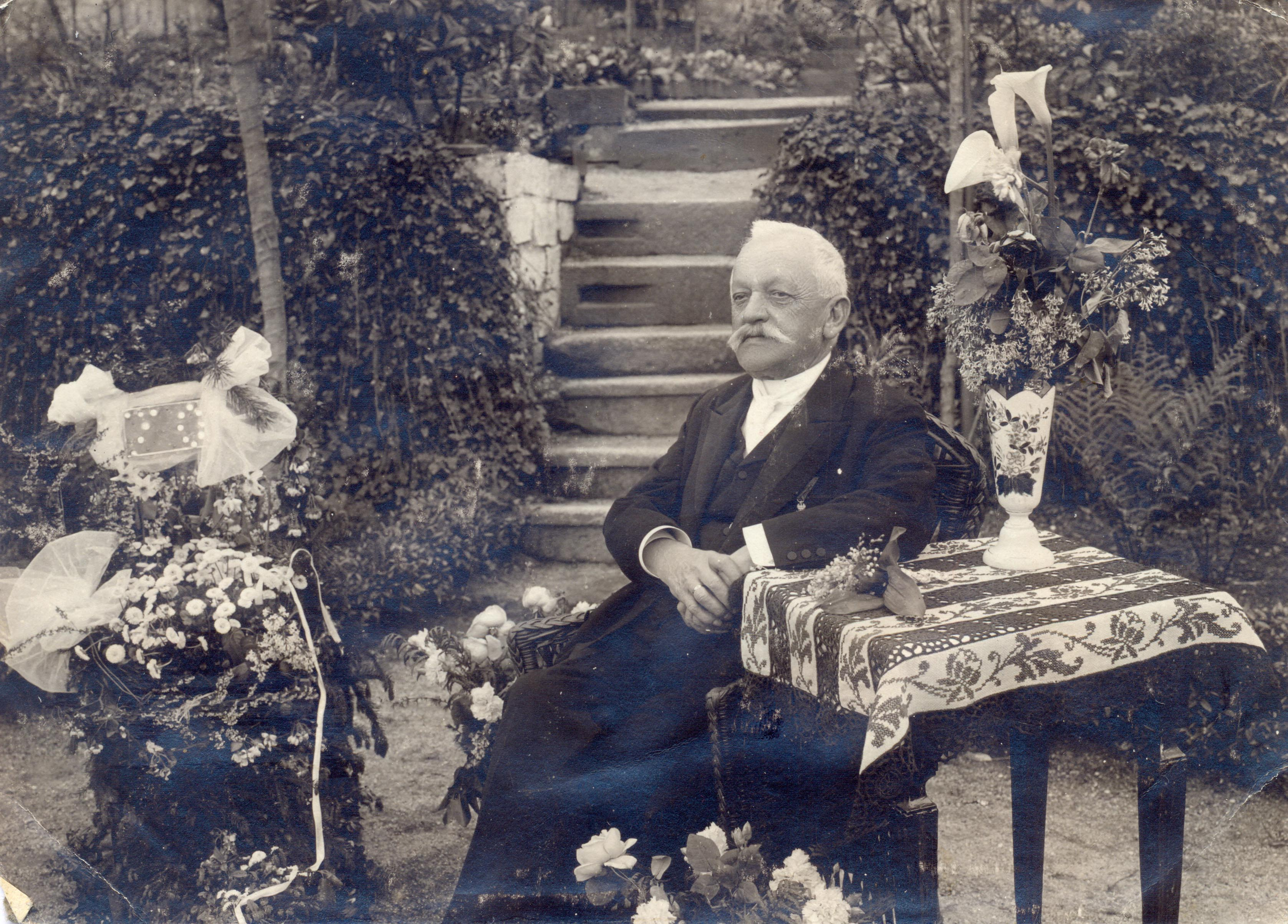 Aufgenommen zu seinem 70. Geburtstag im Garten seines Wohnhauses in Neudek (Nejdek)